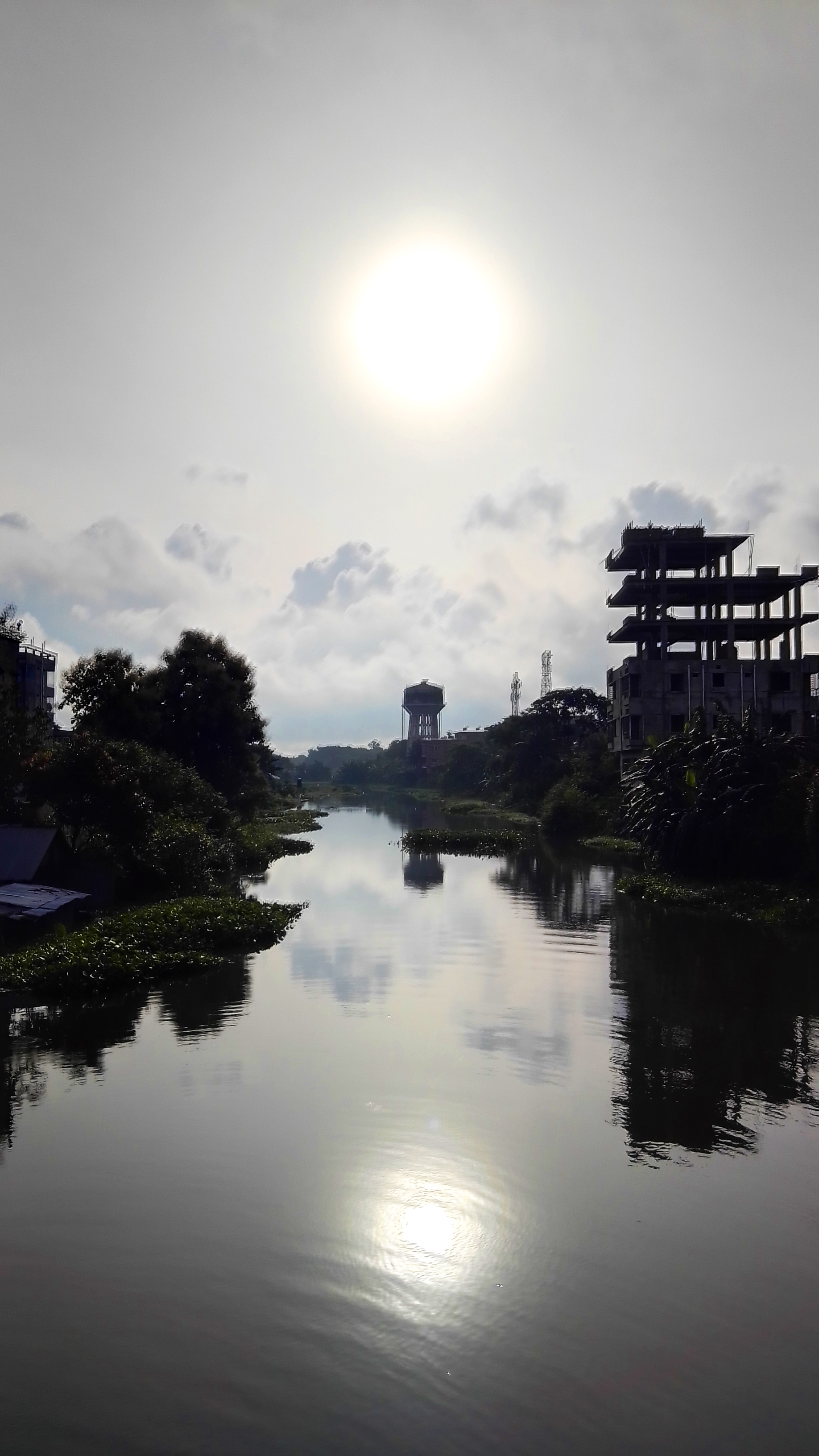 নরসুন্দা নদী, কিশোরগঞ্জ